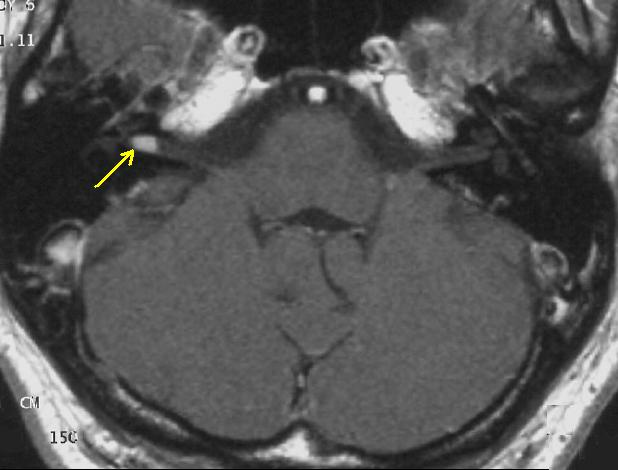 Winziges Schwannom des rechten Nervus vestibularis, inkorrekte aber verbreitete Bezeichnung: Akustikusneurinom, im inneren Gehörgang rechts (im Bild links, mit Pfeil markiert). Transversale T1-gewichtete Kernspintomographie nach Applikation von Kontrastmittel. Tumoren dieser Größe sind ausschließlich mit der Kernspintomographie nachweisbar.